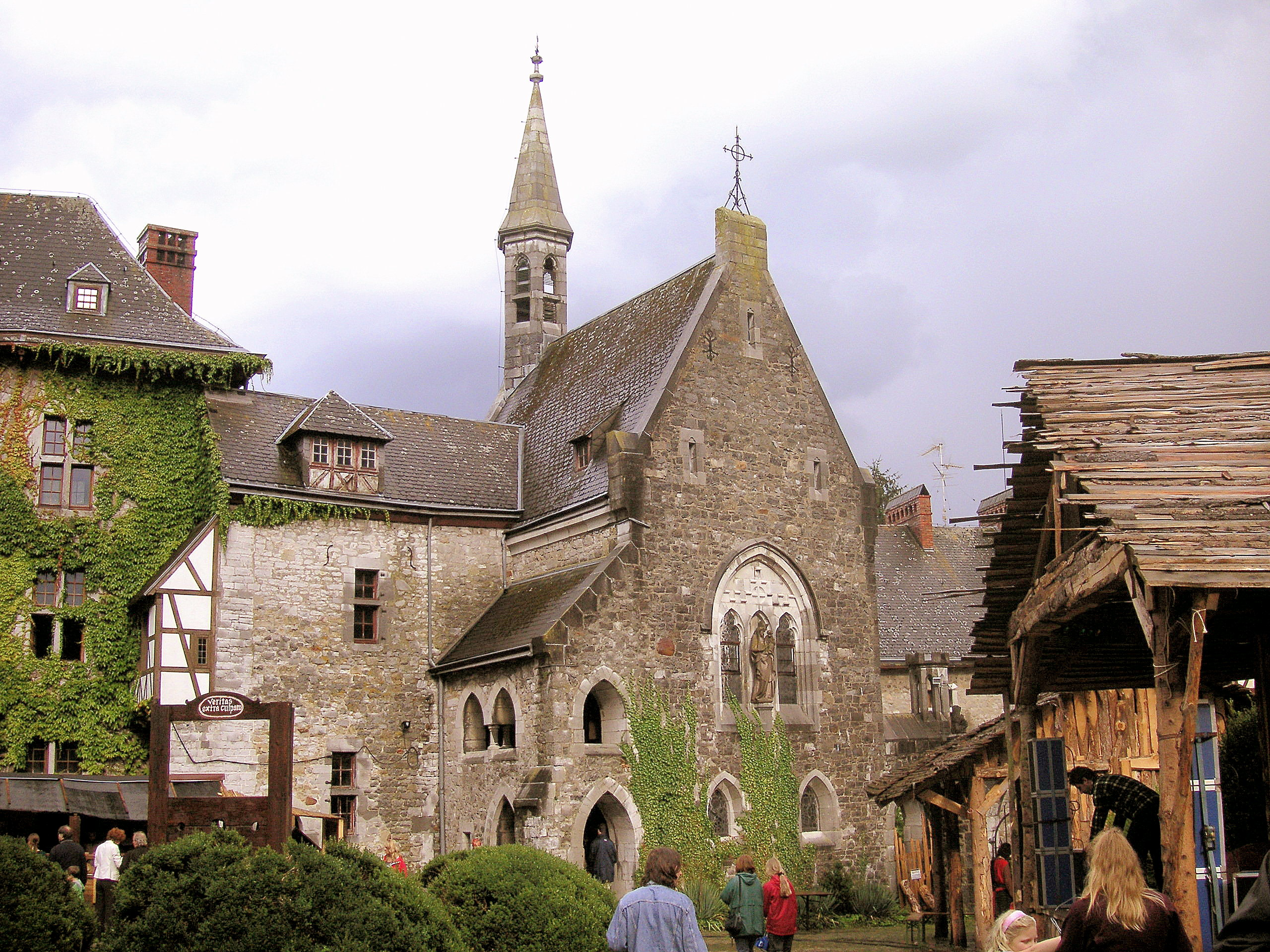 Die Eyneburg